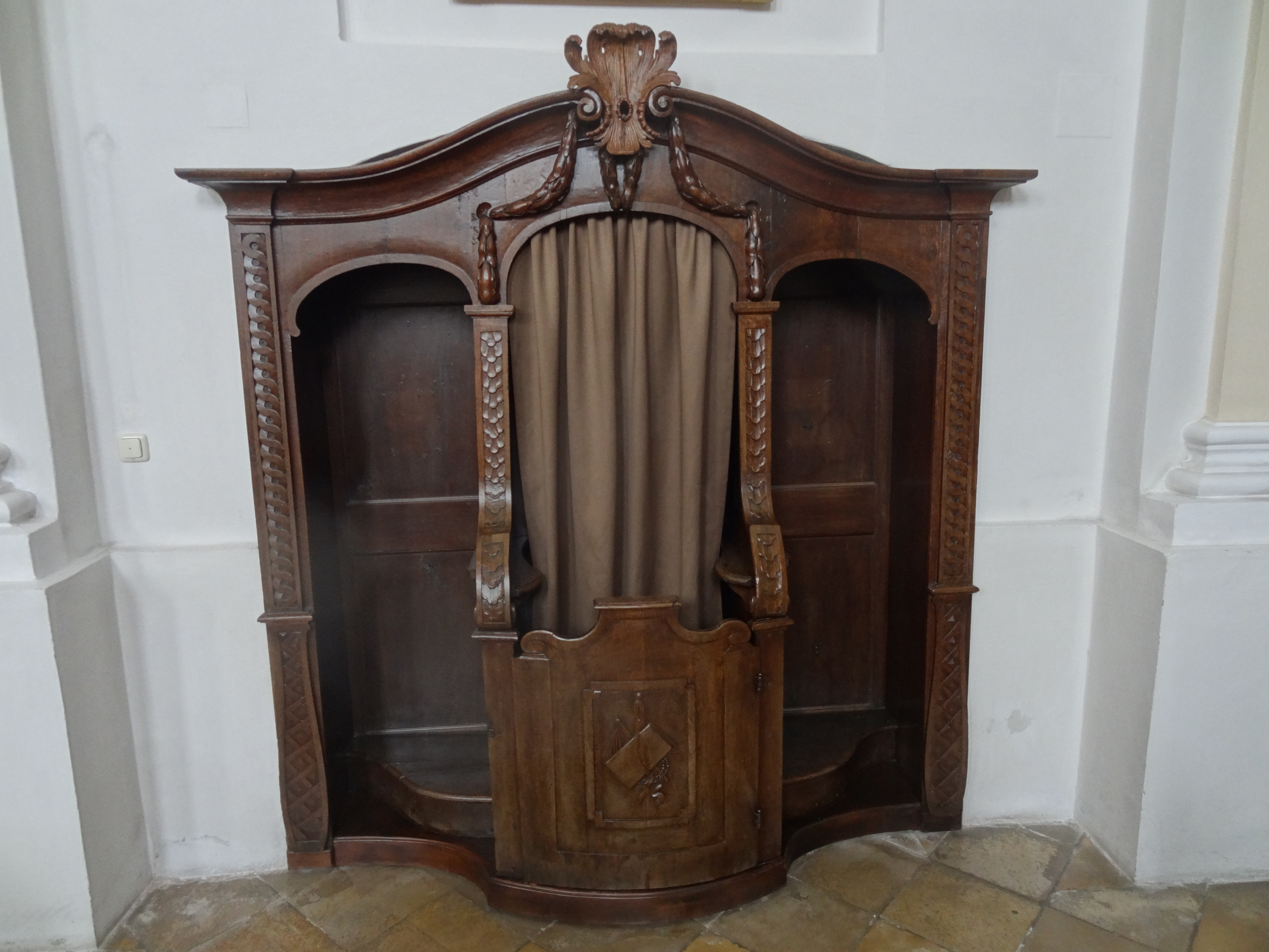 Beichtstuhl in der Pfarrkirche St. Martin in Langenpreising (Landkreis Erding, Oberbayern)